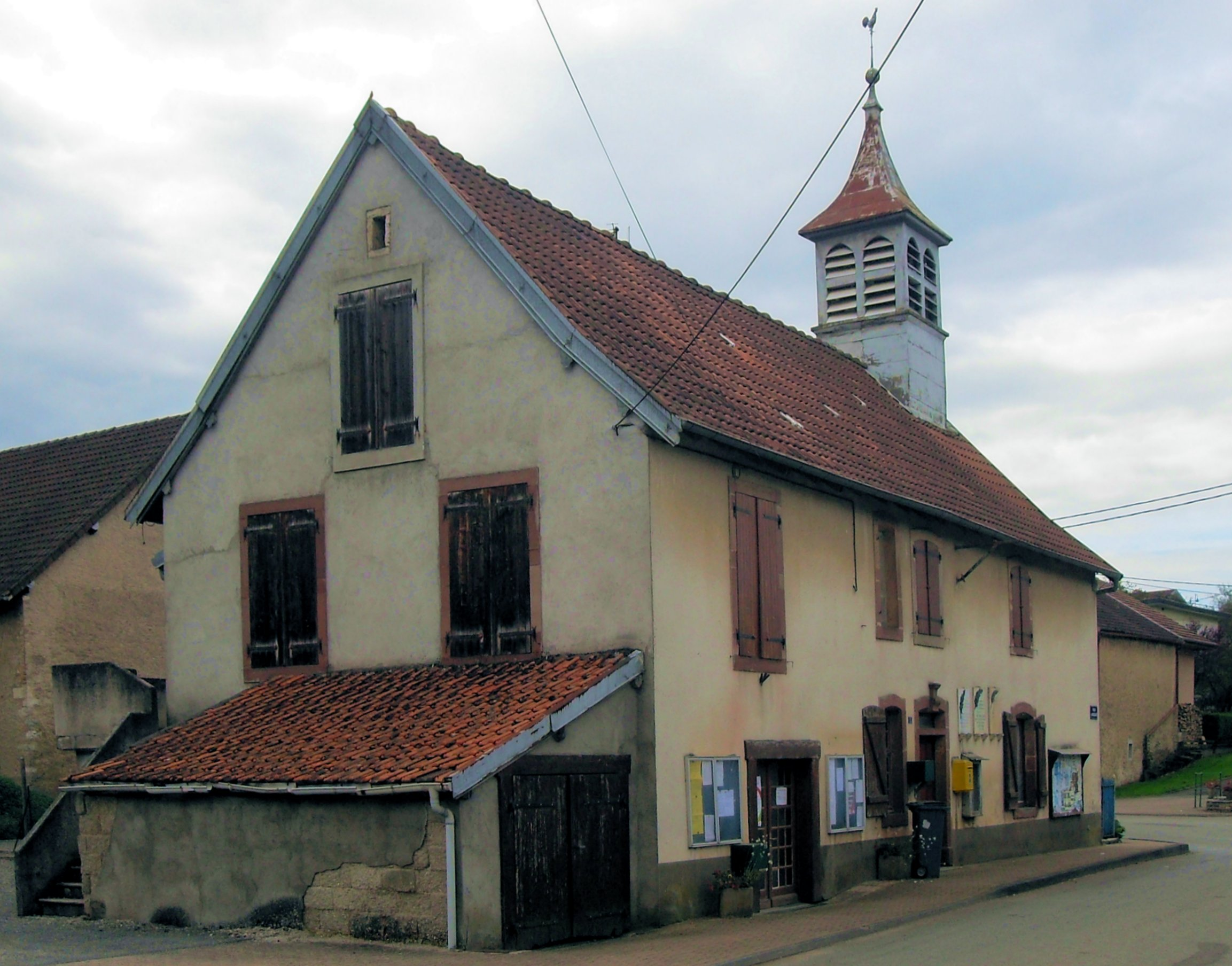 La mairie-école de Semondans